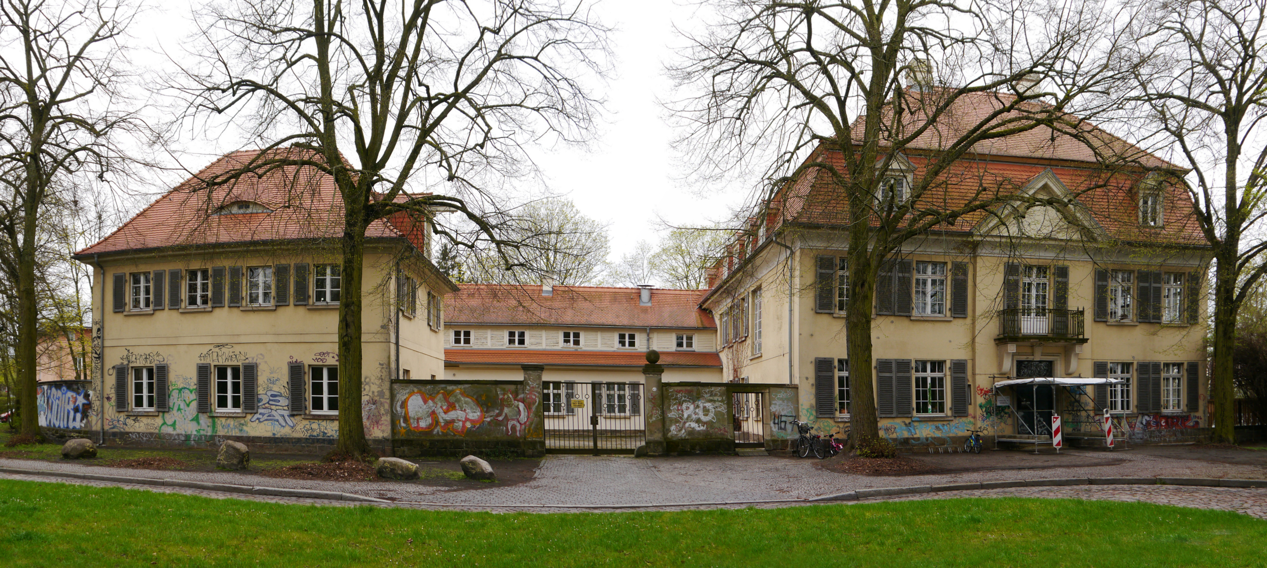 Baudenkmal: Landhaus Andreae, Seestraße 43, Potsdam. Das 1913/14 für den Rittmeister a. D. August Andreae errichtete Gebäude wurde von Paul Schultze-Naumburg entworfen.